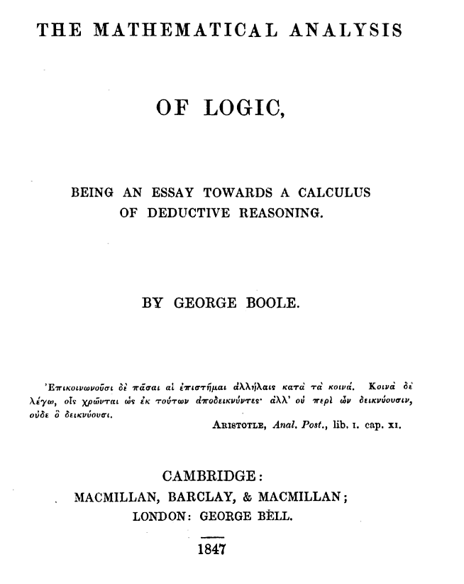 Portada del tratado de George Boole "The Mathematical Analysis of Logic"